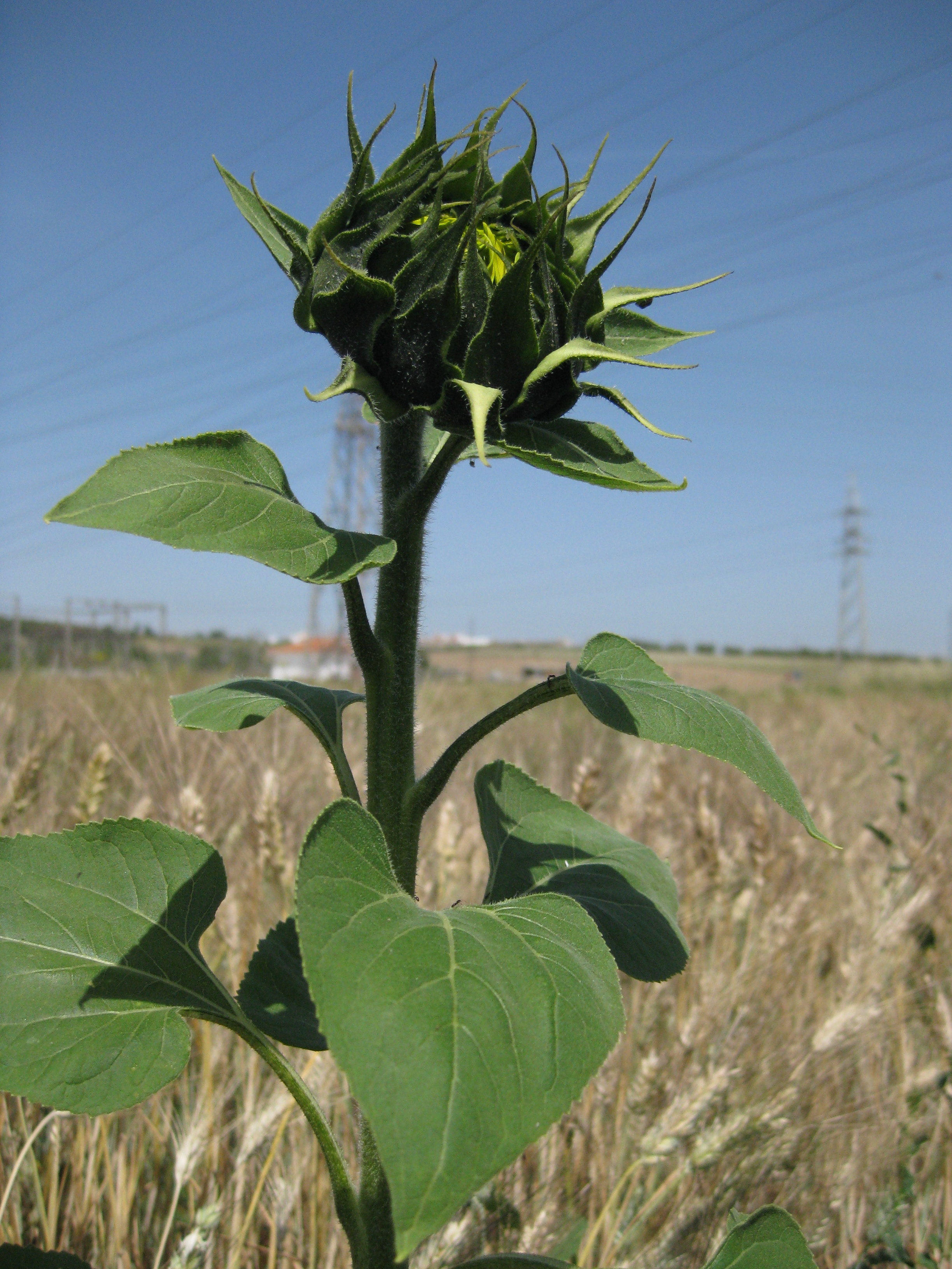 flor del girasol